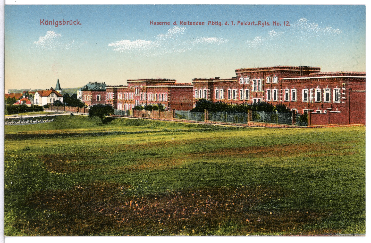 Königsbrück; Kaserne der Reitende Abteilung des 1. Feld-Artillerie-Regiment Nr. 12 This postcard is from publisher Brück & Sohn in Meißen ( postcard has a unique number 13498 and is available in a higher resolution at the publisher. This images was uploaded in a cooperation project between Wikipedians and the publisher.